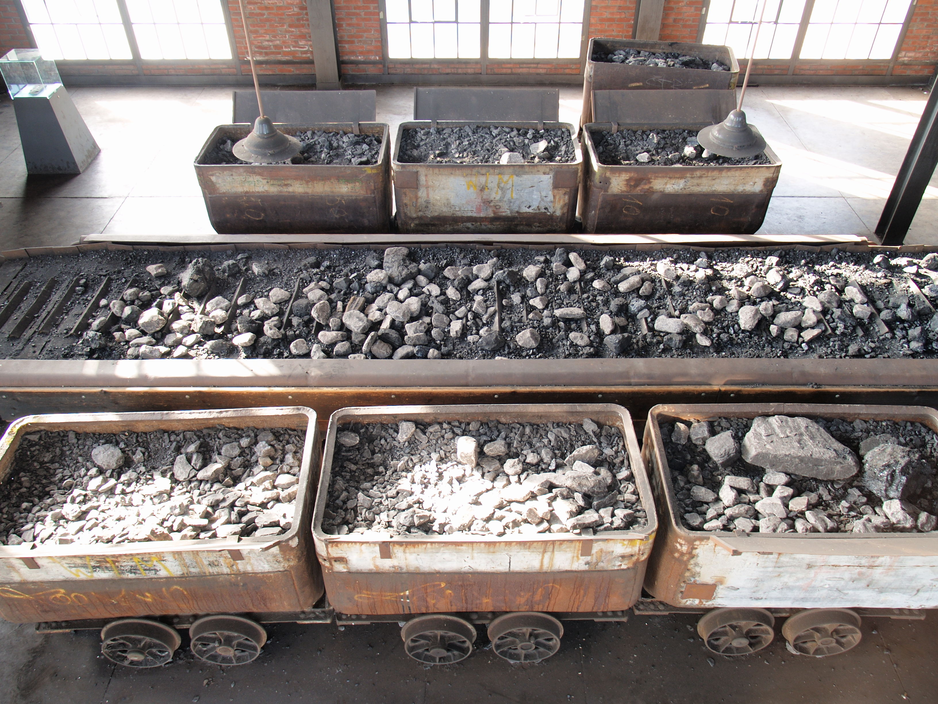 Leseband in der Zeche Zollern, diente zur Trennung der Stückkohlen von Gesteinsbrocken und anderen Fremdstoffen